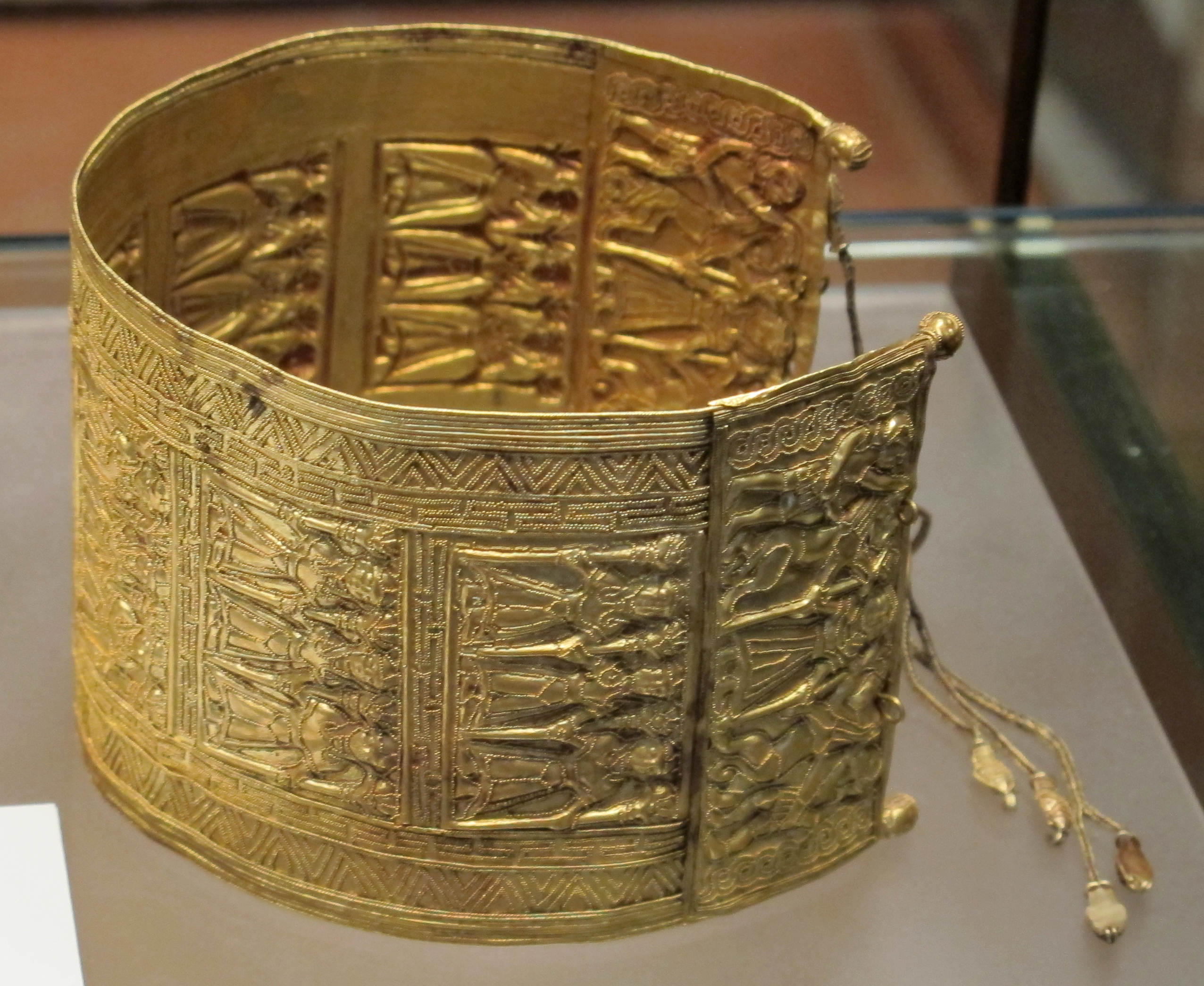 Museo Gregoriano Etrusco